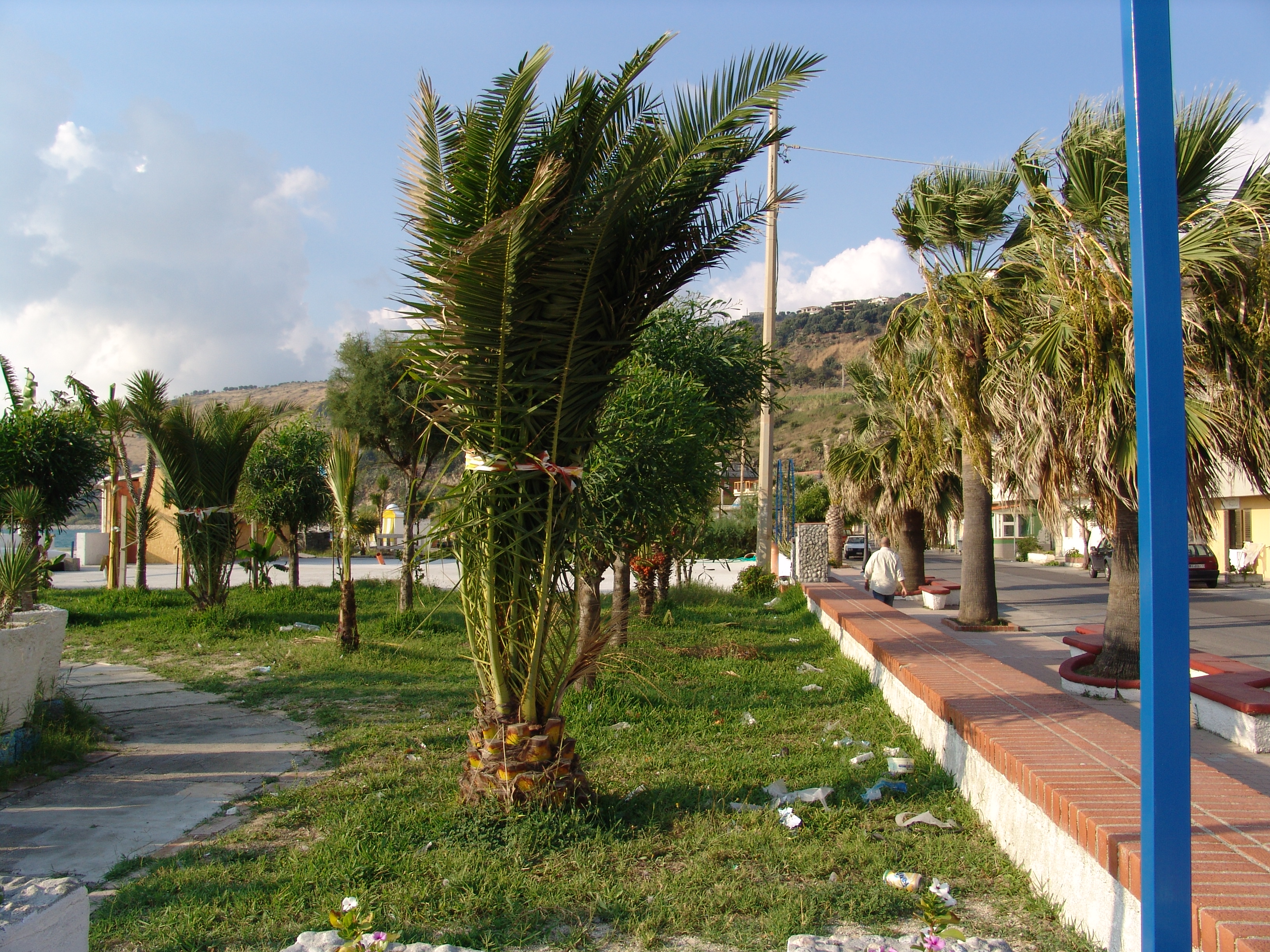 Promenade in Nicotera Kirche in Kalabrien.